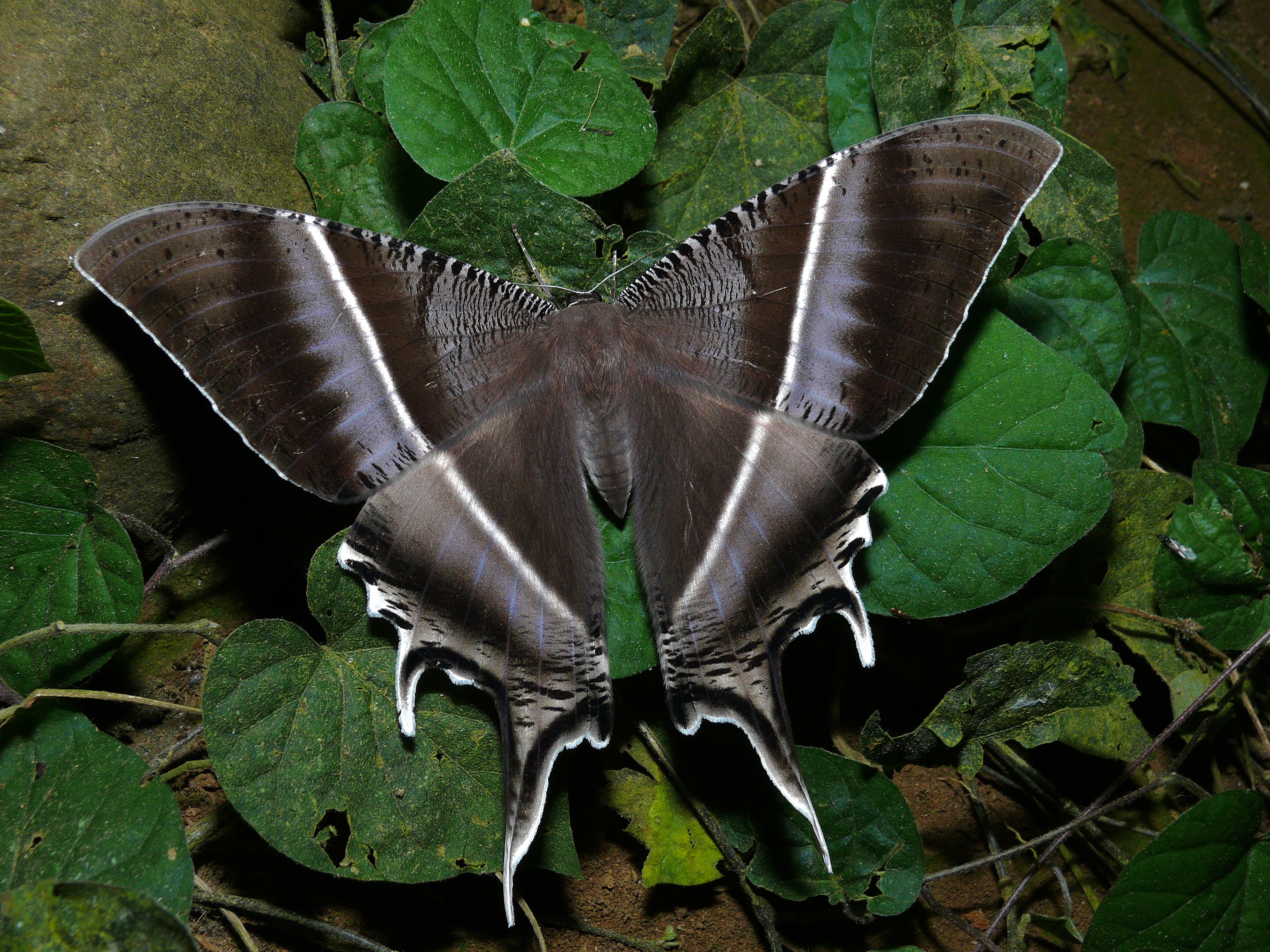 Mount Kinabalu NP, Sabah, MALAYSIA